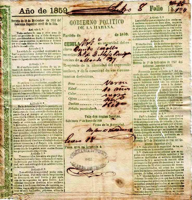 Cédula de identificación personal o "carné de identidad" de un esclavo